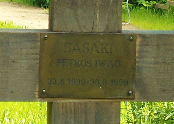 Могила Петроса Сасаки. Табличка на кресте крупным планом.